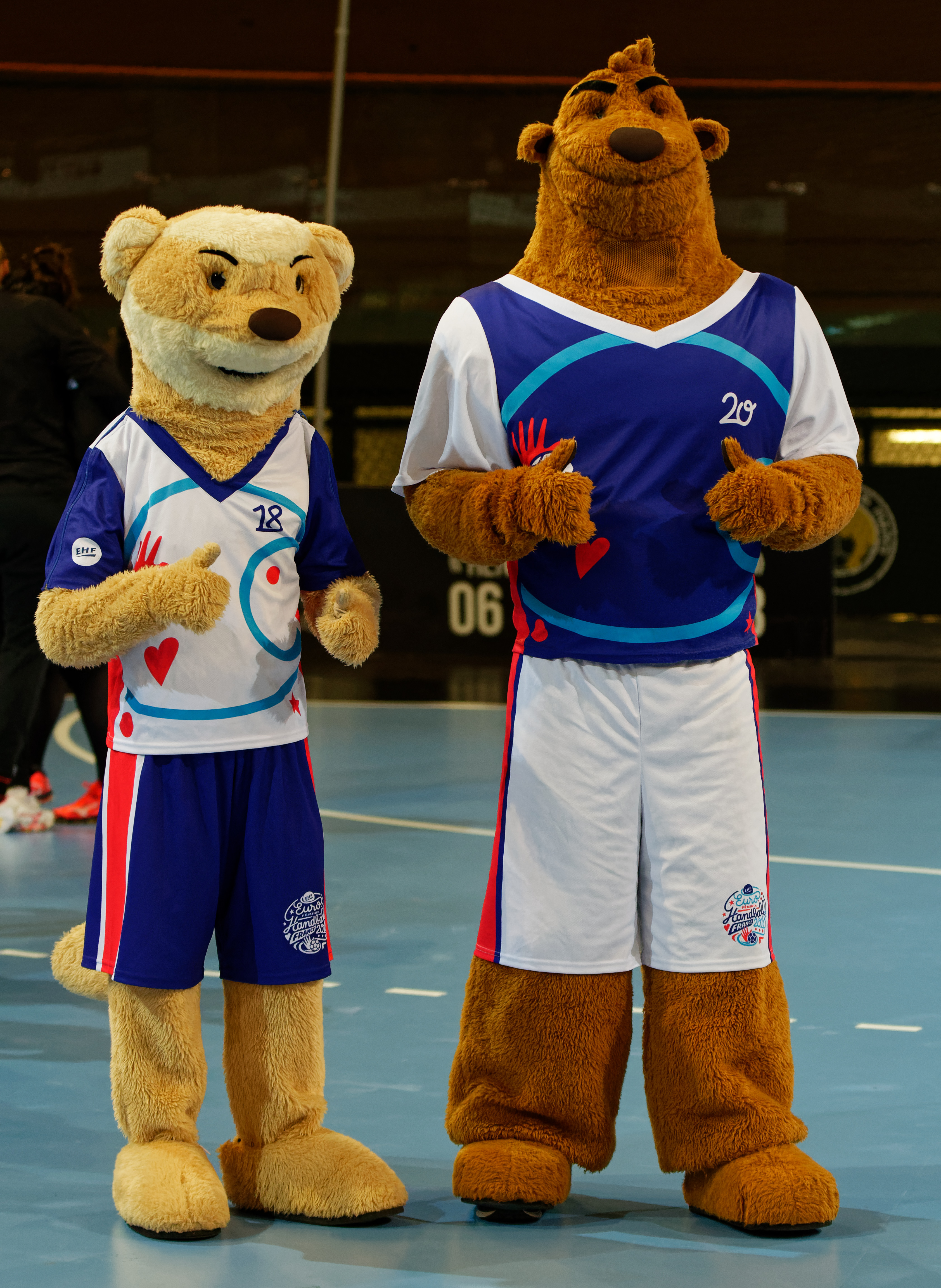 Rok et Koolette les mascottes de l'Euro féminin de handball 2018, avant le match de coupe EHF Issy Paris Hand / Vipers Kristiansand. Au vélodrome de Saint-Quentin en Yvelines, le 3 mars 2018.